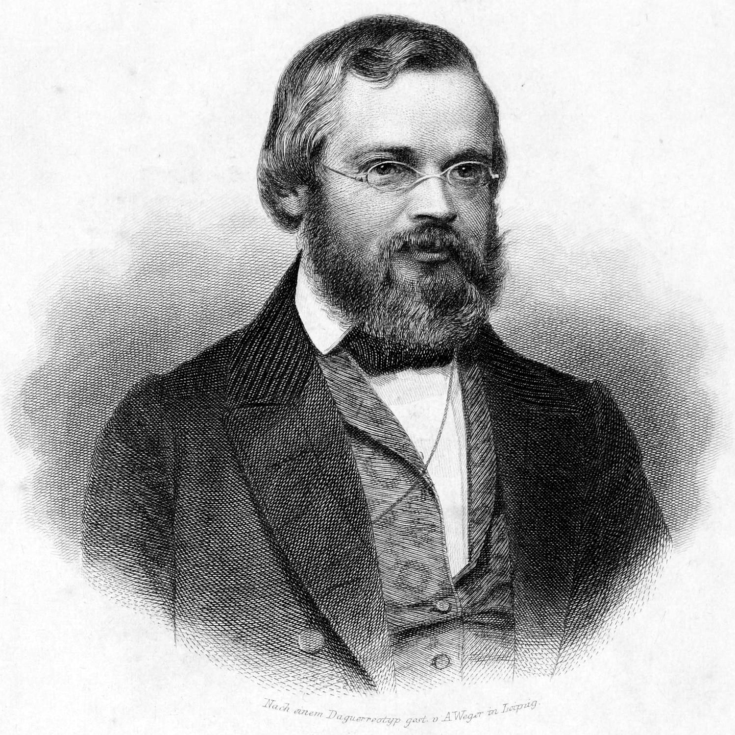 Otto Jahn Otto Jahn. Stich von August Weger nach einer anonymen Daguerrotypie (Beethoven-Haus Bonn, B 1113)